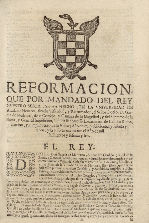 Reforma de 1666 de las Constituciones de la Universidad de Alcalá. Publicada en Alcalá de Henares, en 1716. Texto en español. Fol. (30x21 cm.)